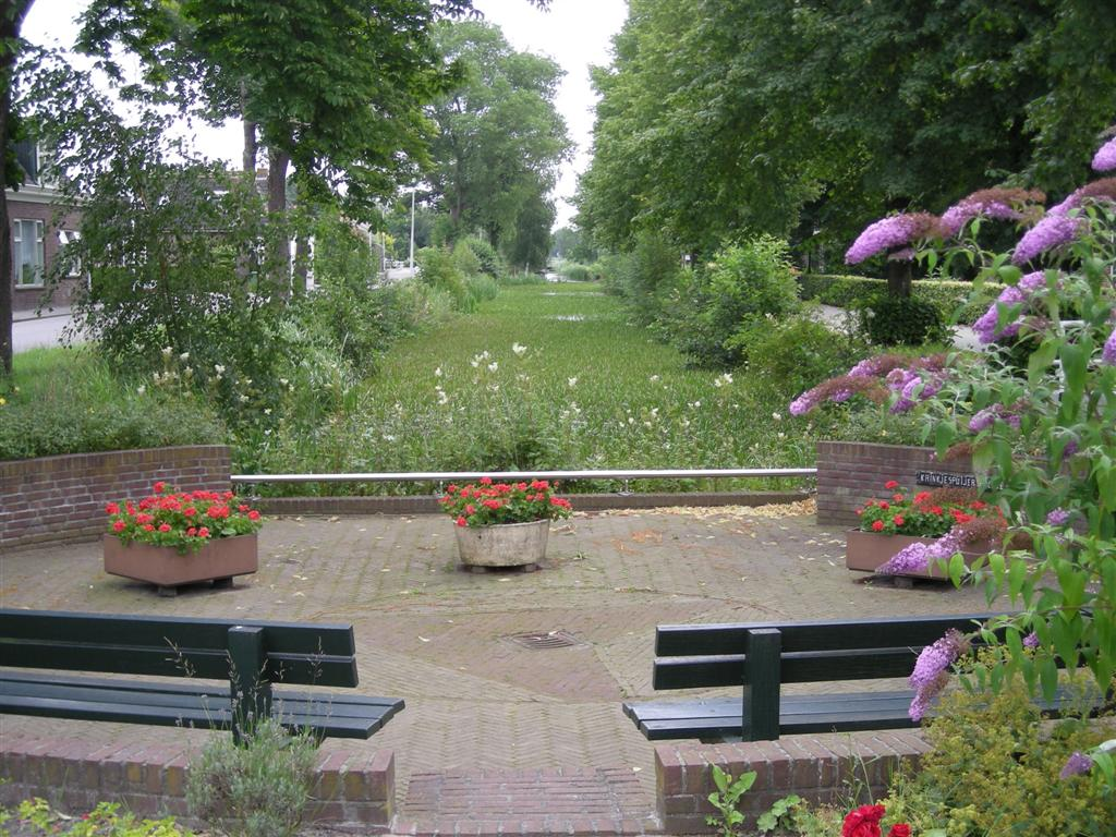 Schoterlandse Compagnonsvaart bij De Knijpe (Heerenveen) (canal)